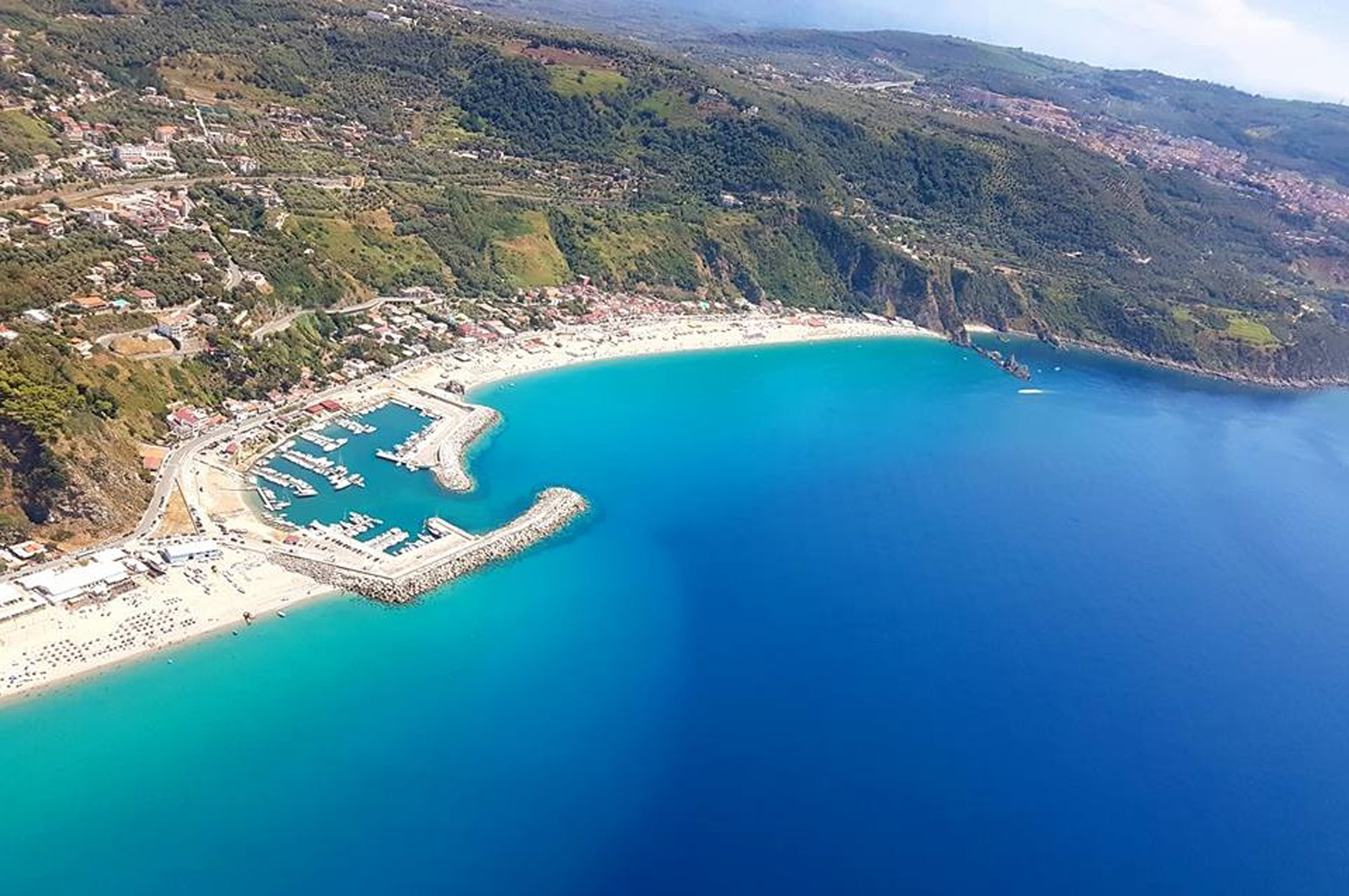 Il lungomare della Tonnara di Palmi e il porto turistico.